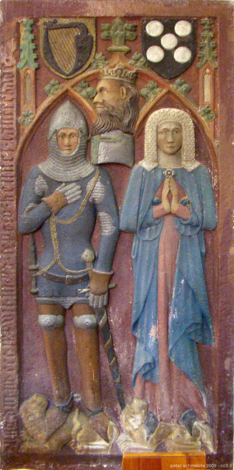 Epitaph des Hennel Landschad von Steinach († 1377) und seiner Gemahlin Mia von Sickingen in der evang. Kirche in Neckarsteinach